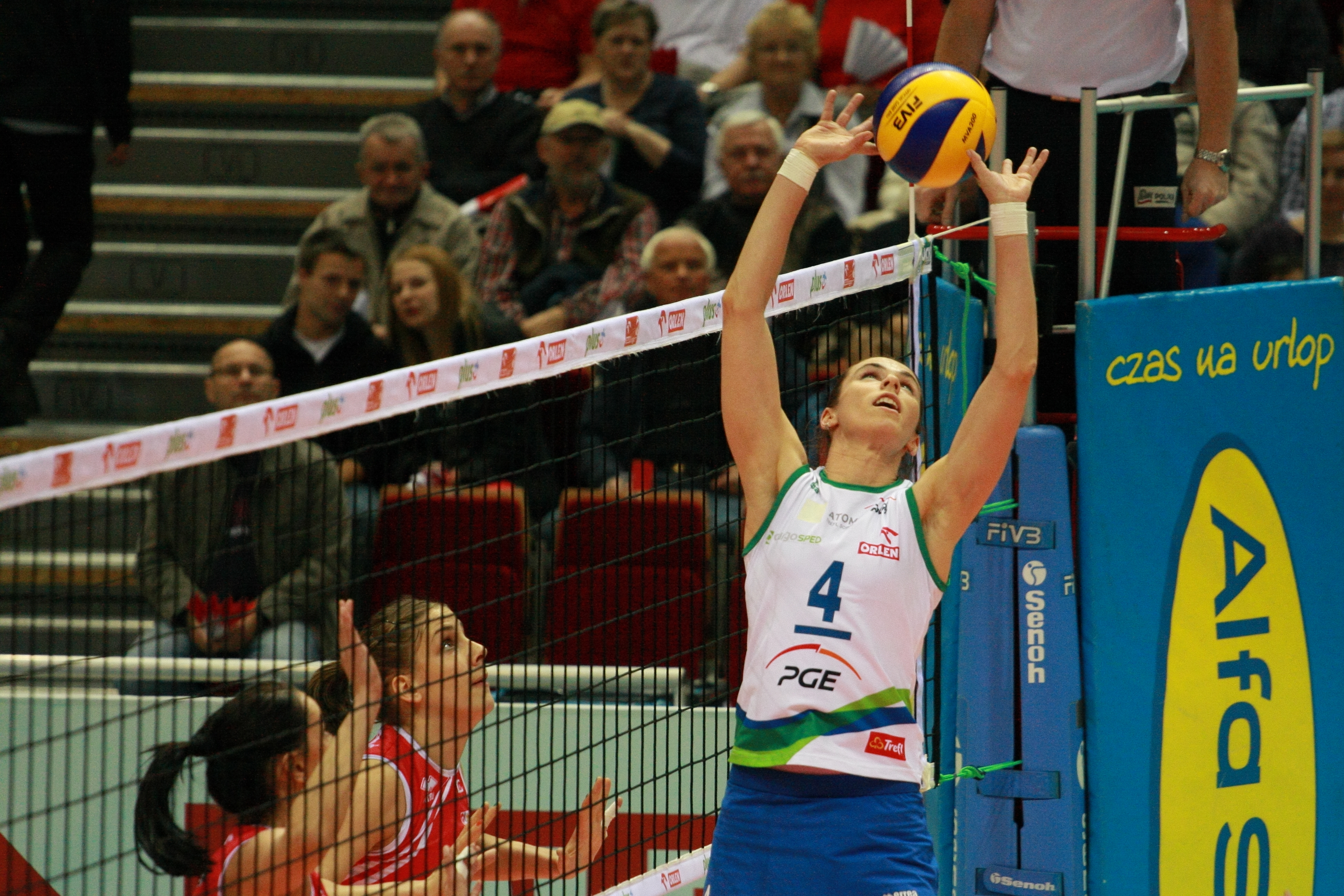 Izabela Bełcik